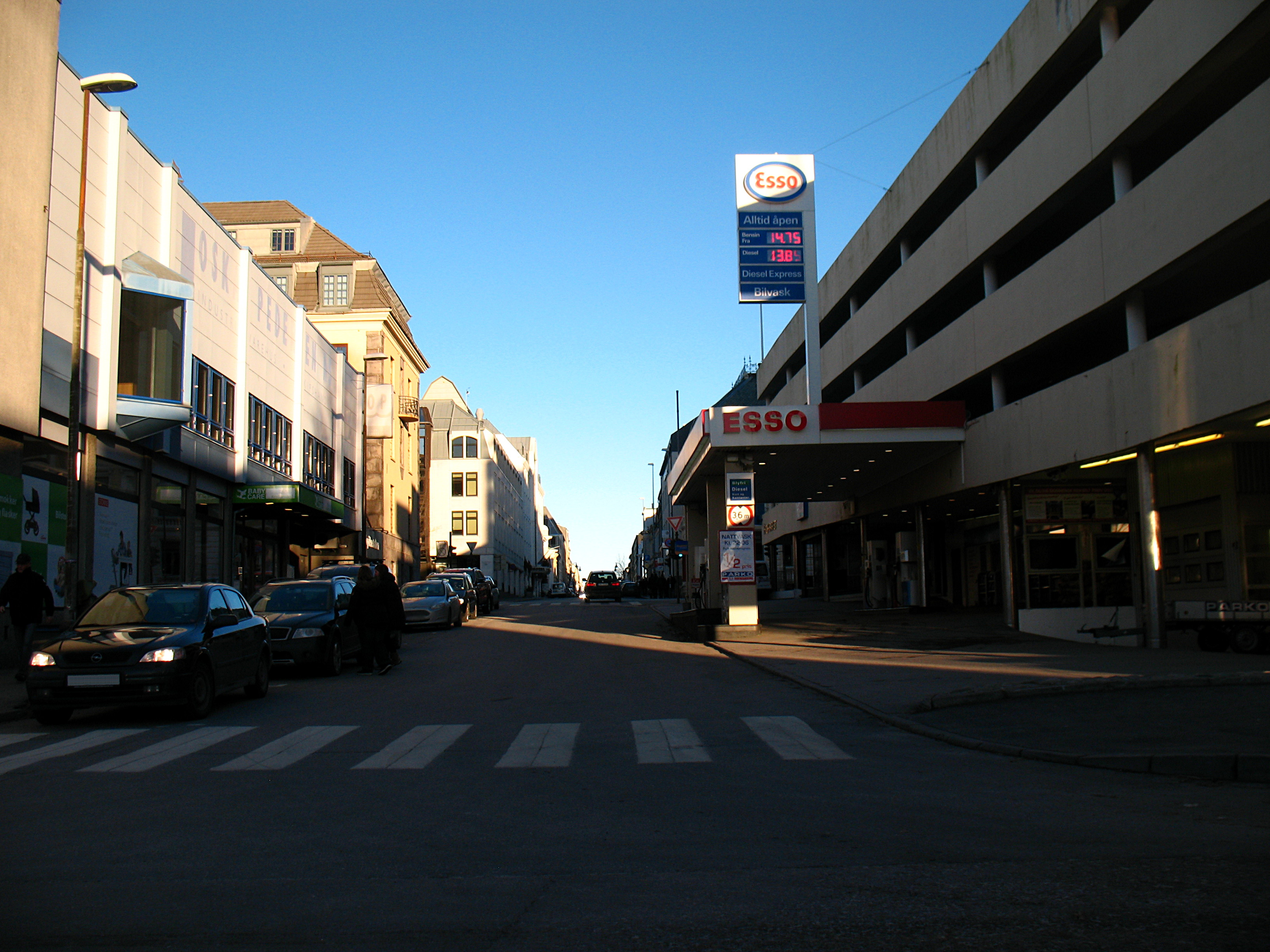 Dronningens gate der den krysser Vestre Strandgate i bydelen Kvadraturen i Kristiansand. Til venstre Oskar Pedersens Industrivarehus og skipshandel, parkeringshuset Parko til høyre.